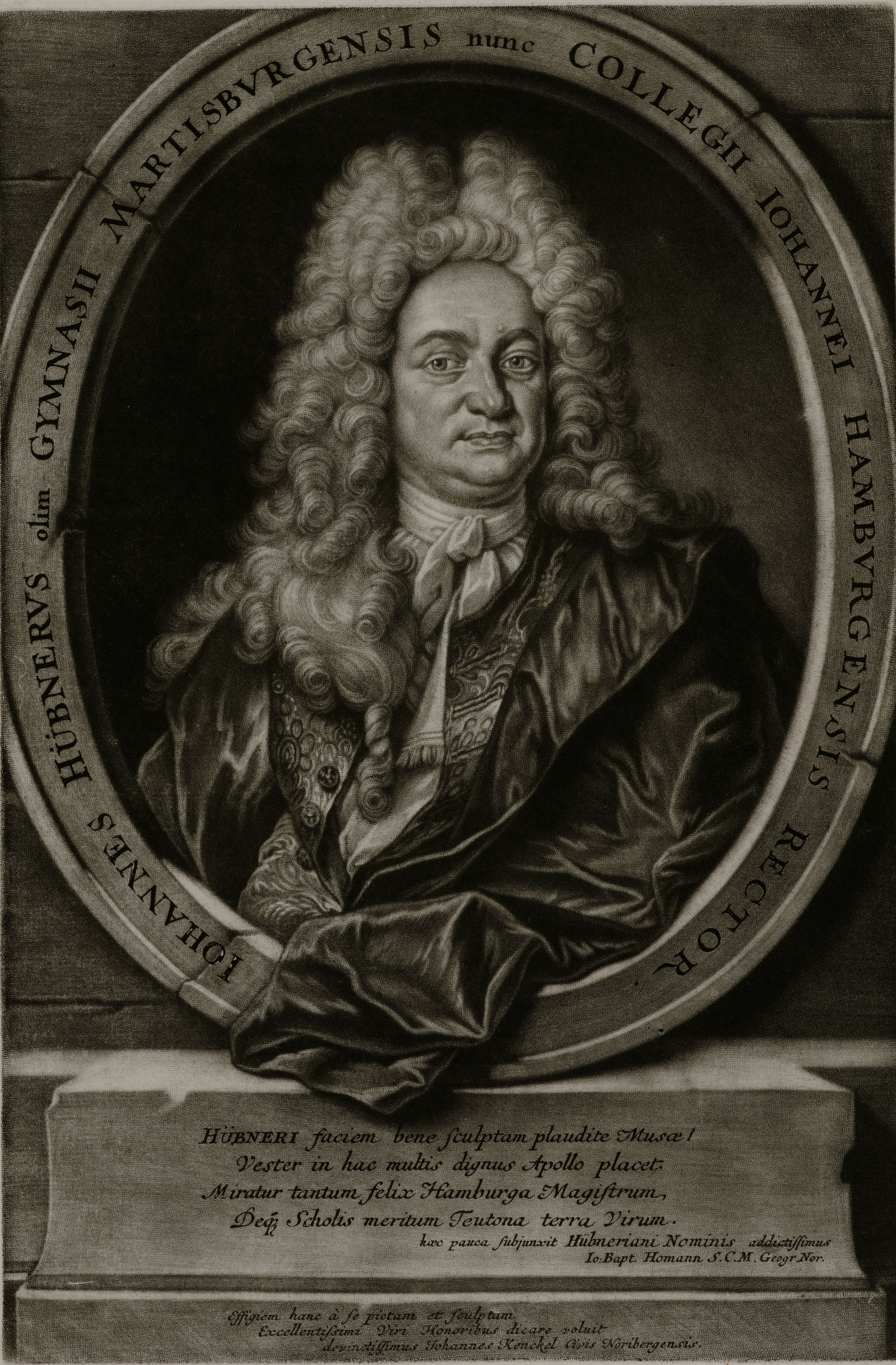 Bildnis von Johann Hübner